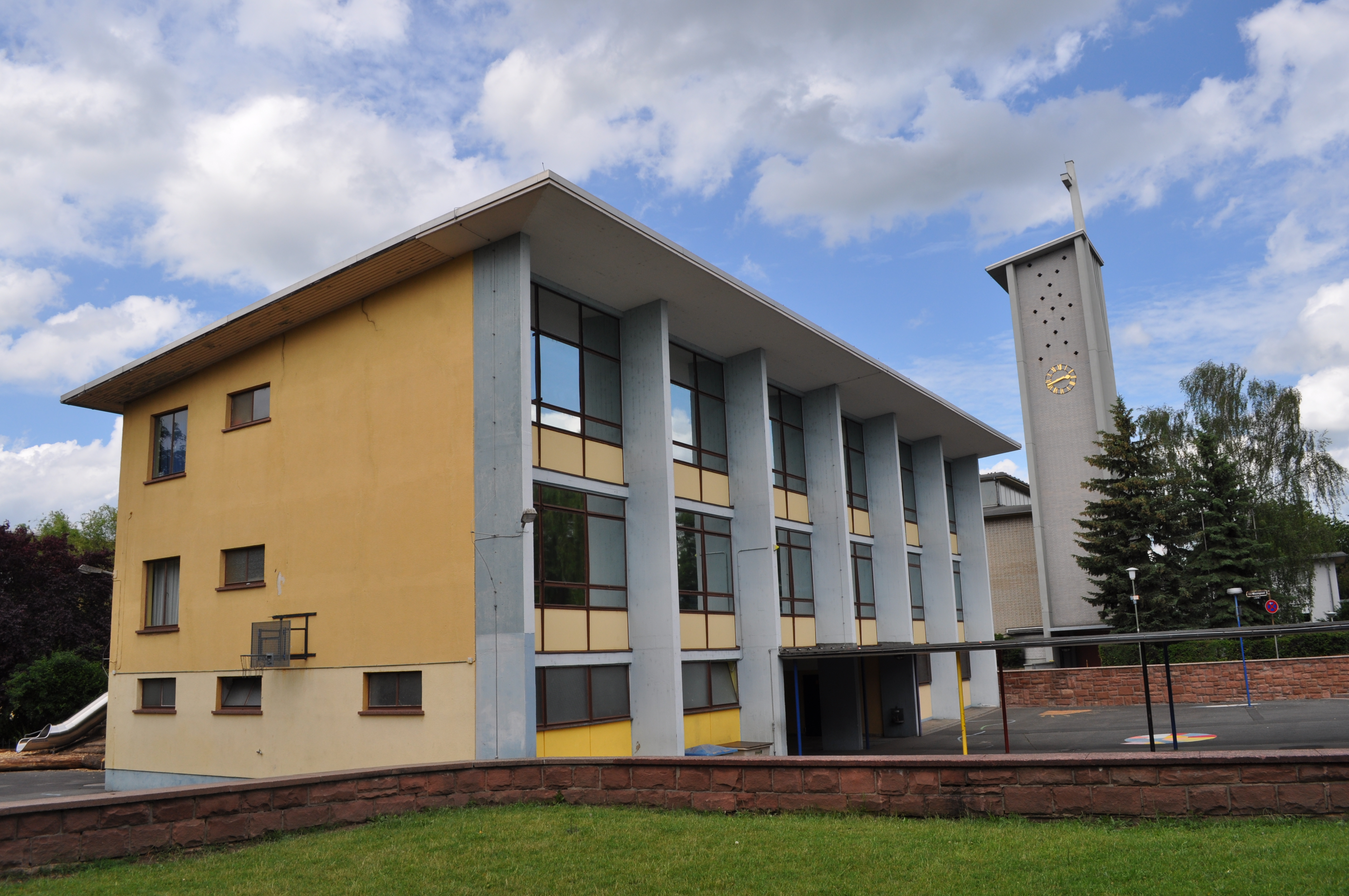 Offenbach-Waldheim, Friedrich Eber-Schule